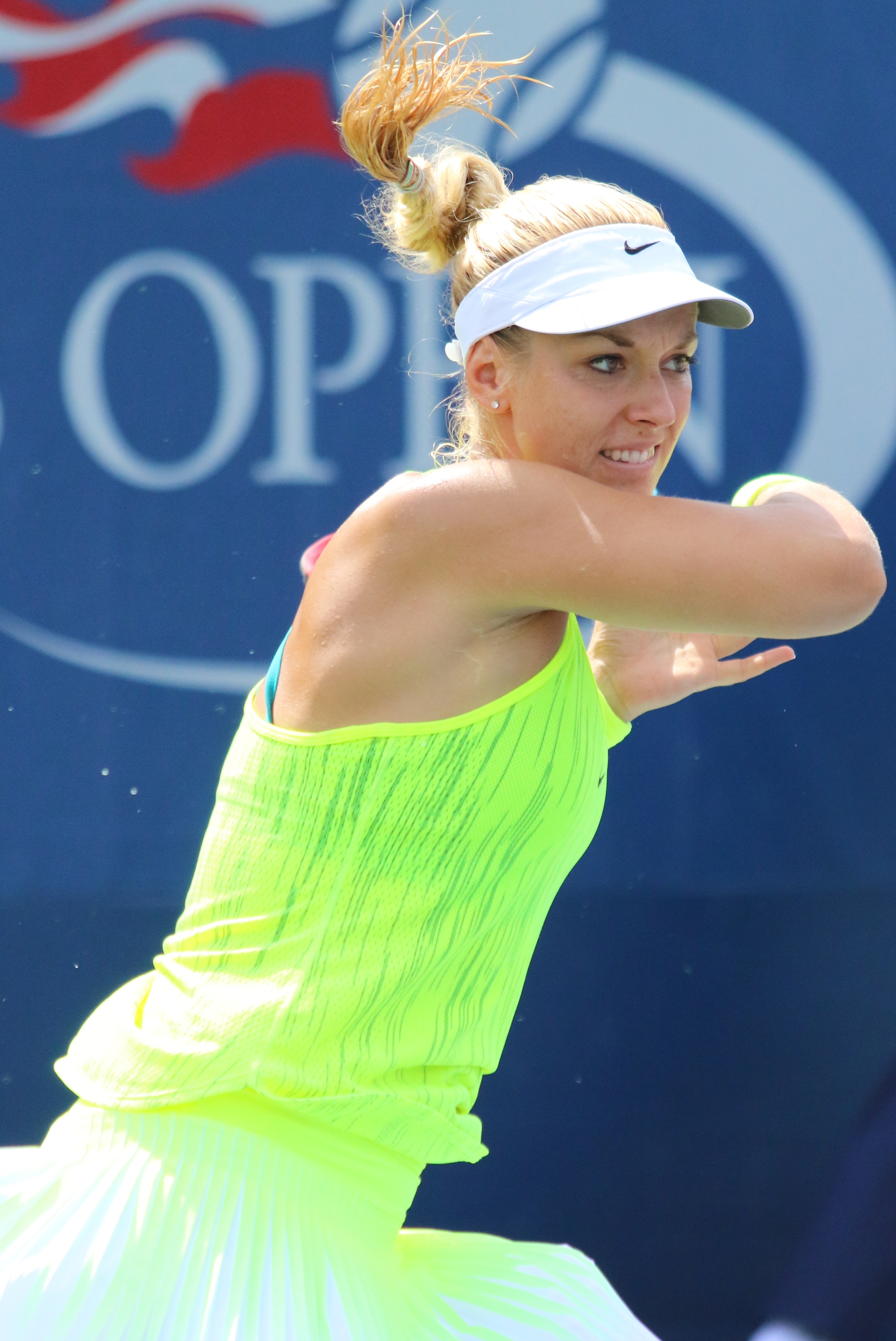 Lisicki US16 (16)